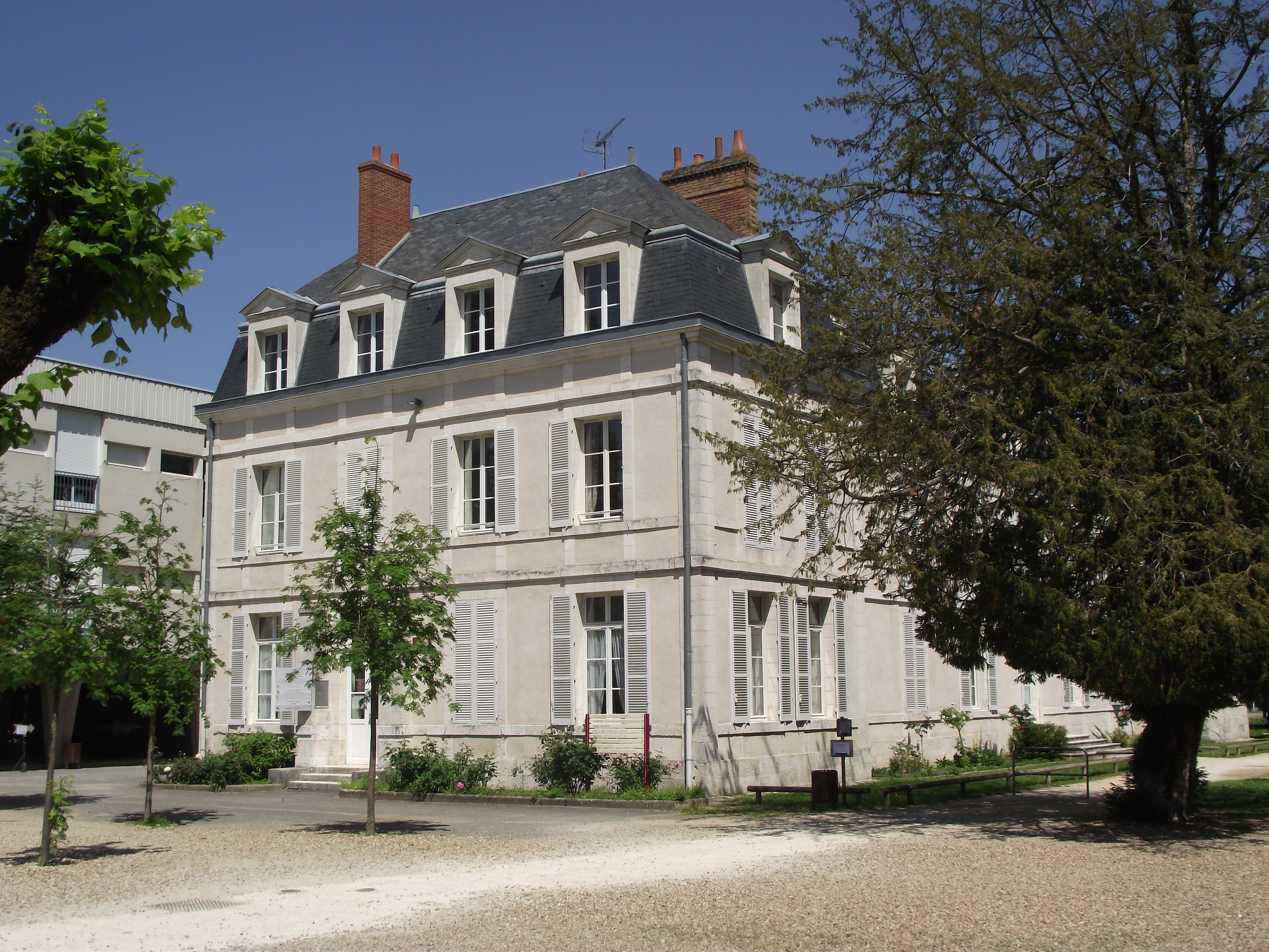 Bâtiment Lunier (ex villa Lunier). Cité scolaire Augustin-Thierry.